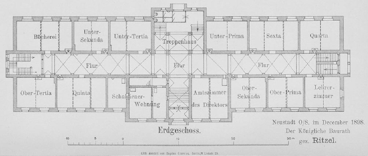 Rzut parteru